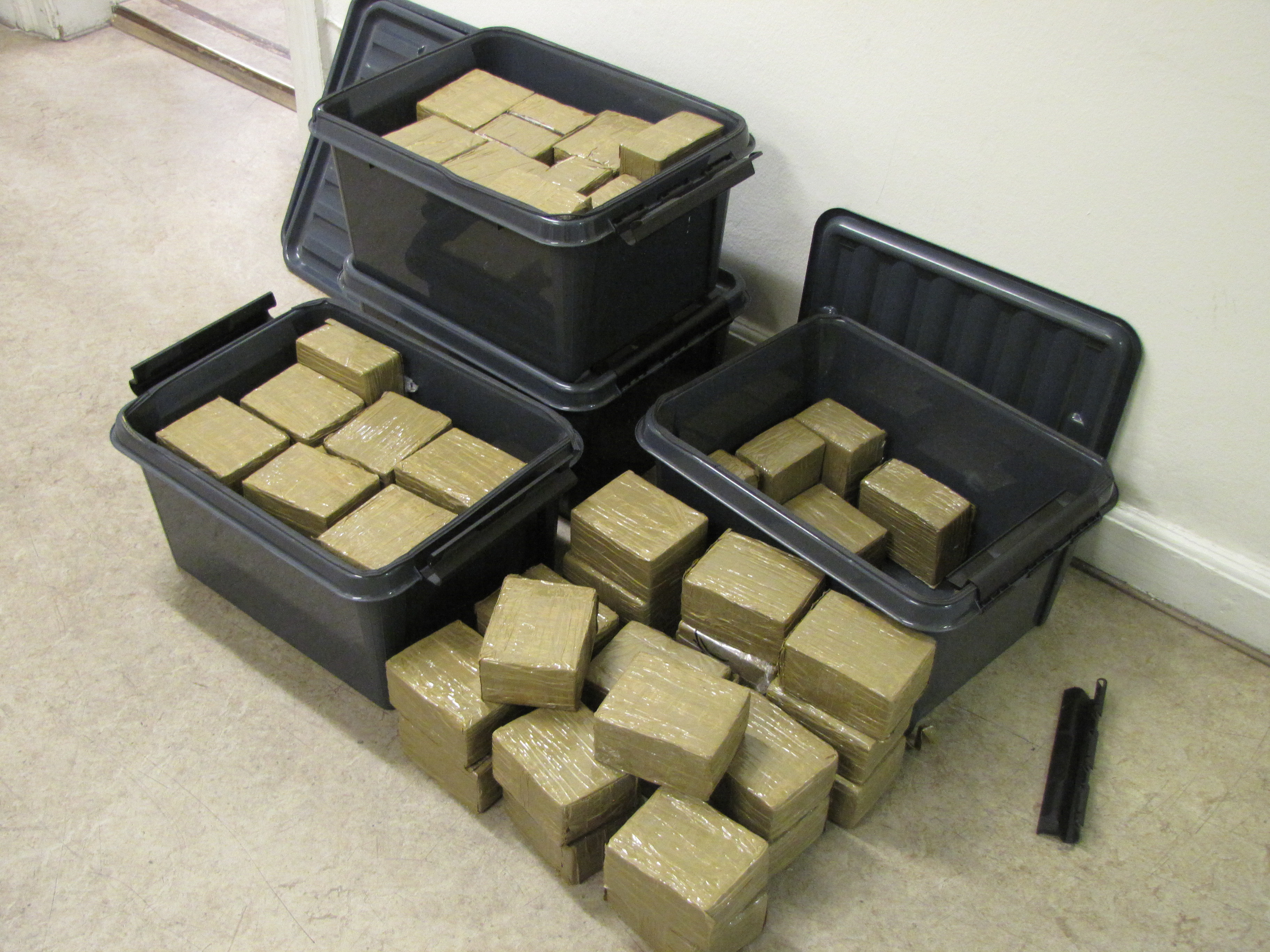 Foto frigivet af Københavns Politi i forbindelse med en pressemeddelelsen "Seks anholdelser i sag om håndtering af ca. 200 kg hash" med indledningen Task Force Pusherstreet, Københavns Politi, har her til morgen foretaget anholdelse af seks personer, som alle er sigtet for indsmugling af ca. 200 kg hash. "